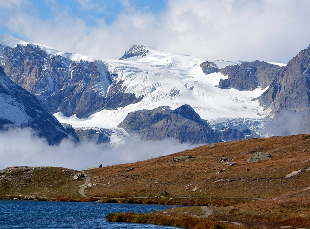 Blick auf den Zmuttgletsher vom Stellisee aus